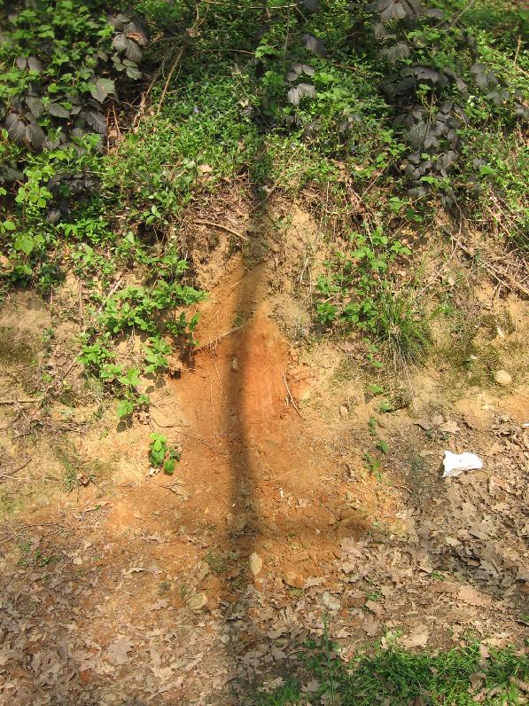 Reddish paleosoil, Lombardy